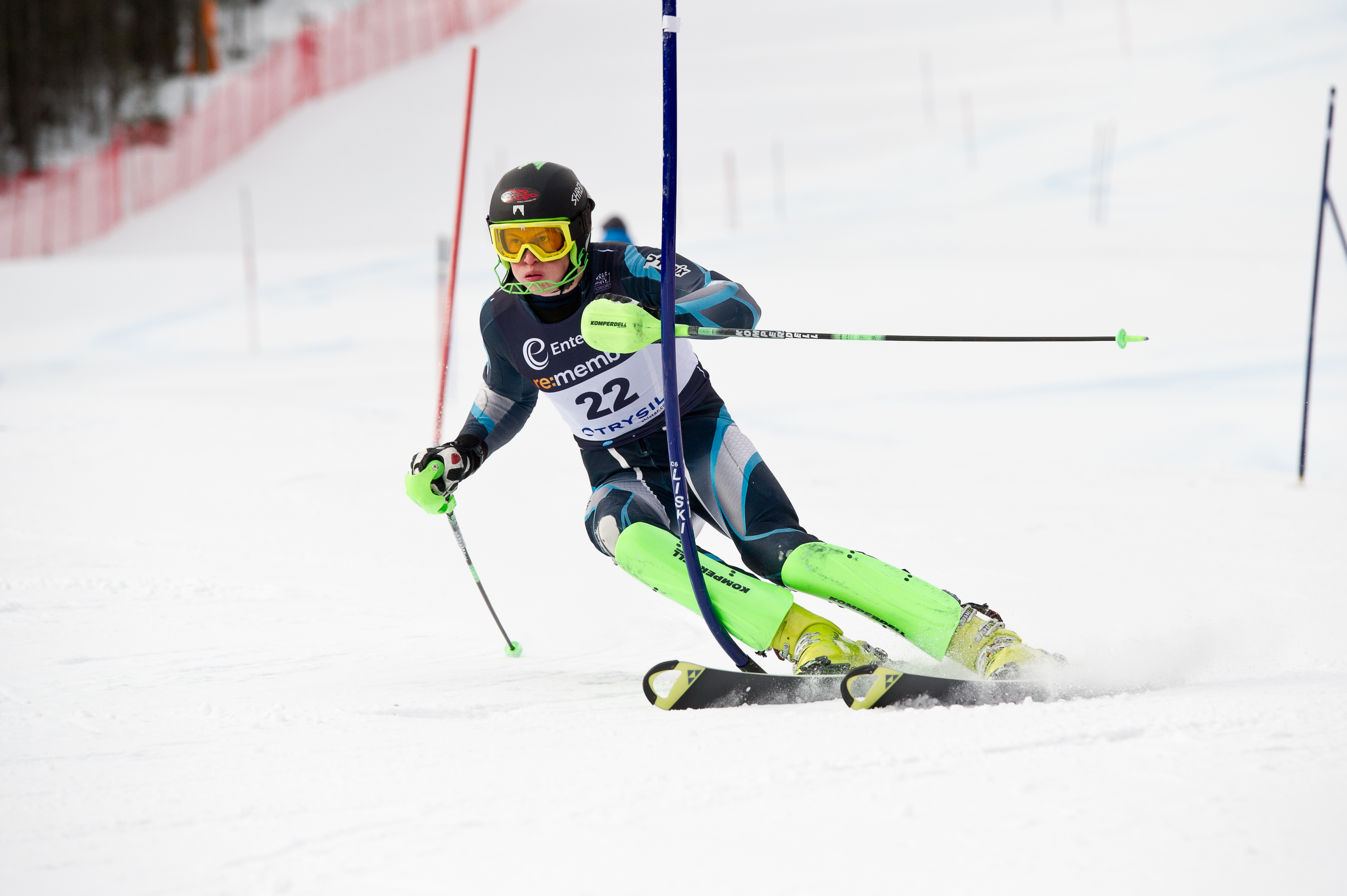 Nikolai Tornø Narvestad kjører NM i slalåm i Trysil søndag 27. mars 2011.